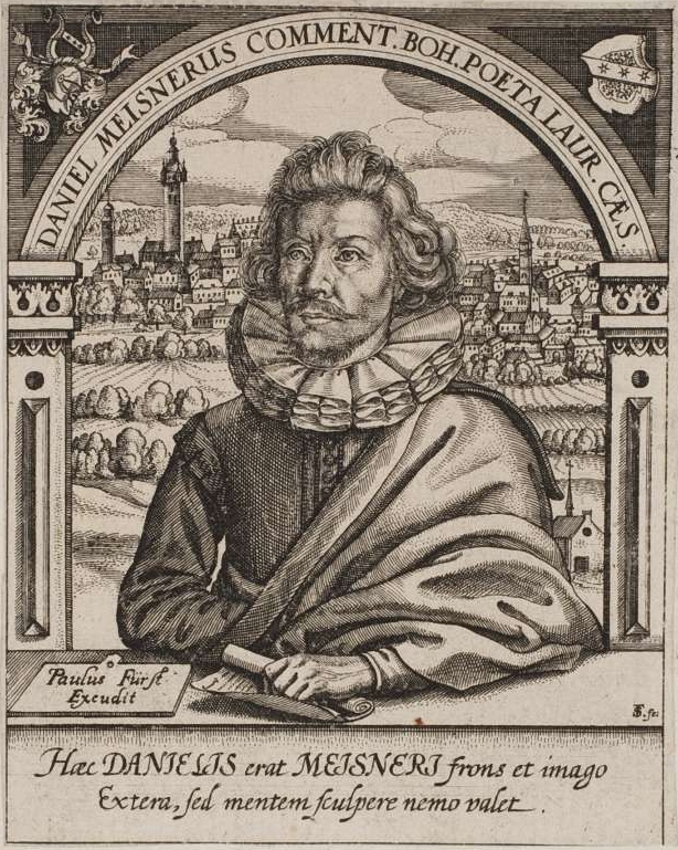 Bildnis Daniel Meisner; Verlagsort: Nürnberg